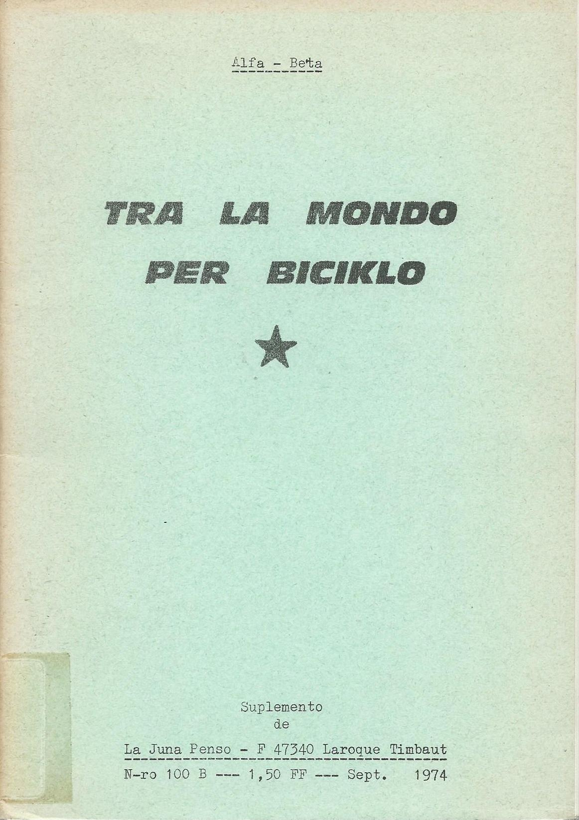 kovrilo de libreto "Tra la Mondo per Biciklo", 1974